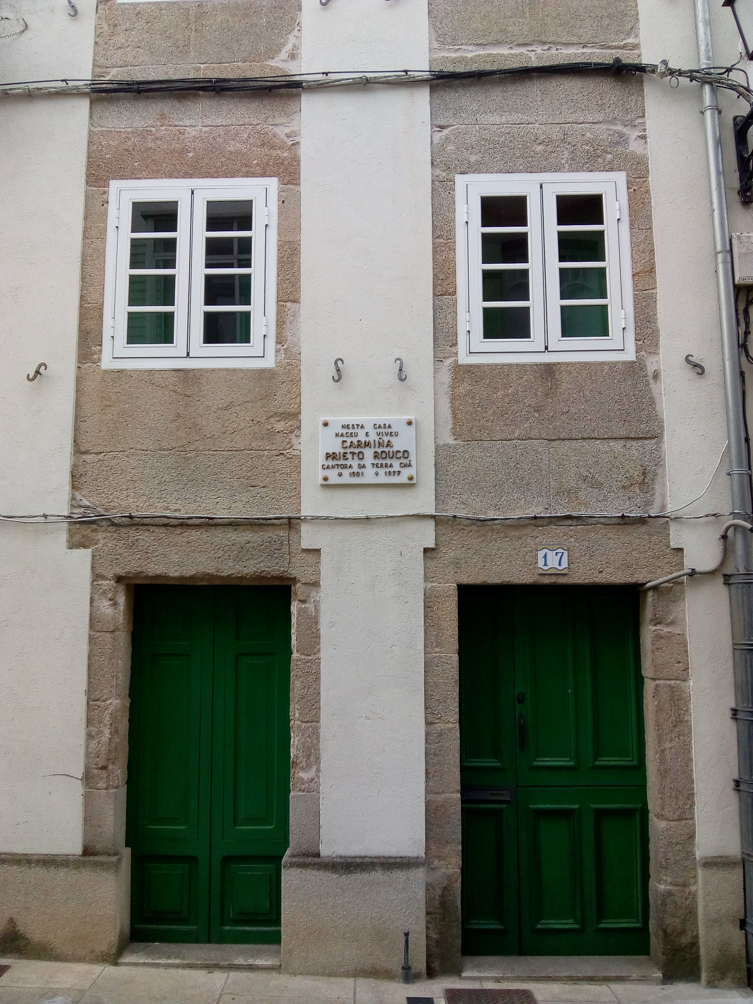 Placa e casa de Carmiña Prieto Rouco na r/Porta de Cima, en Vilalba. Tomada o 20200602